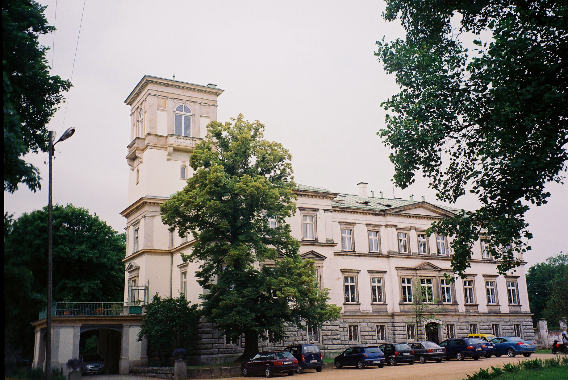 Morawa - pałac, 2 poł. XIX